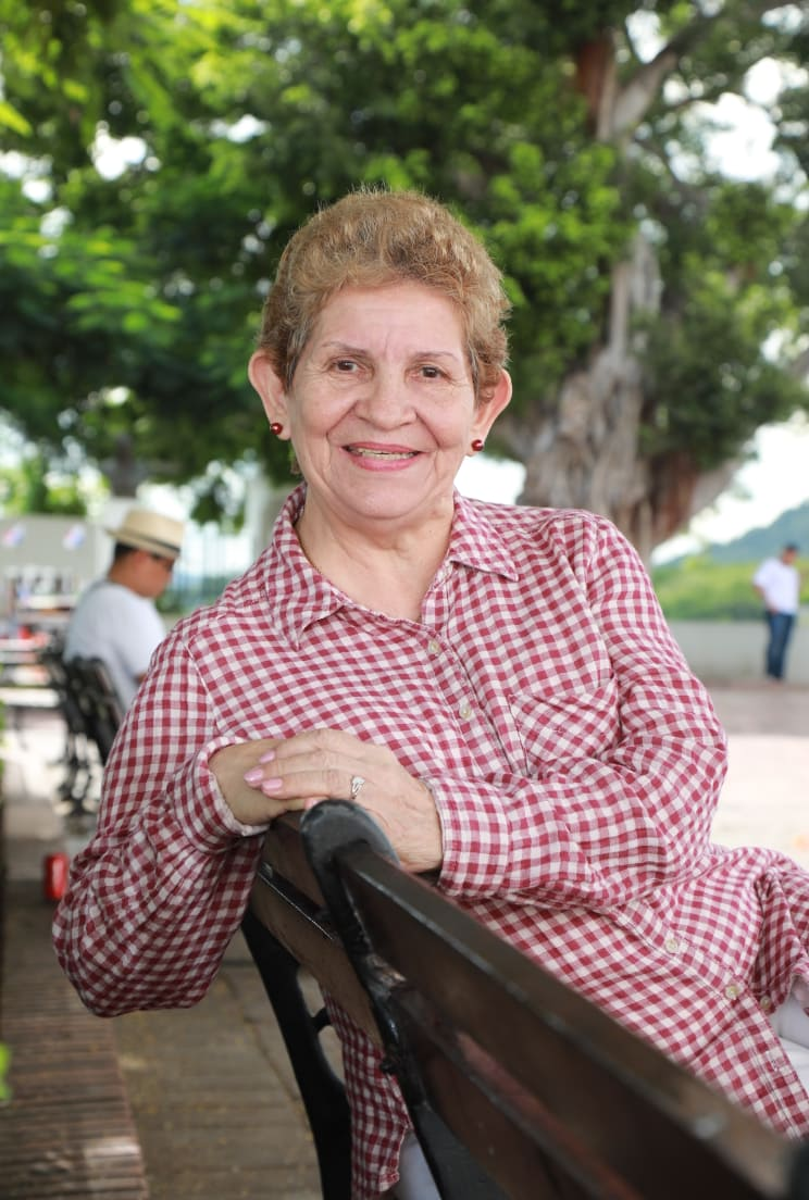 Fotografía